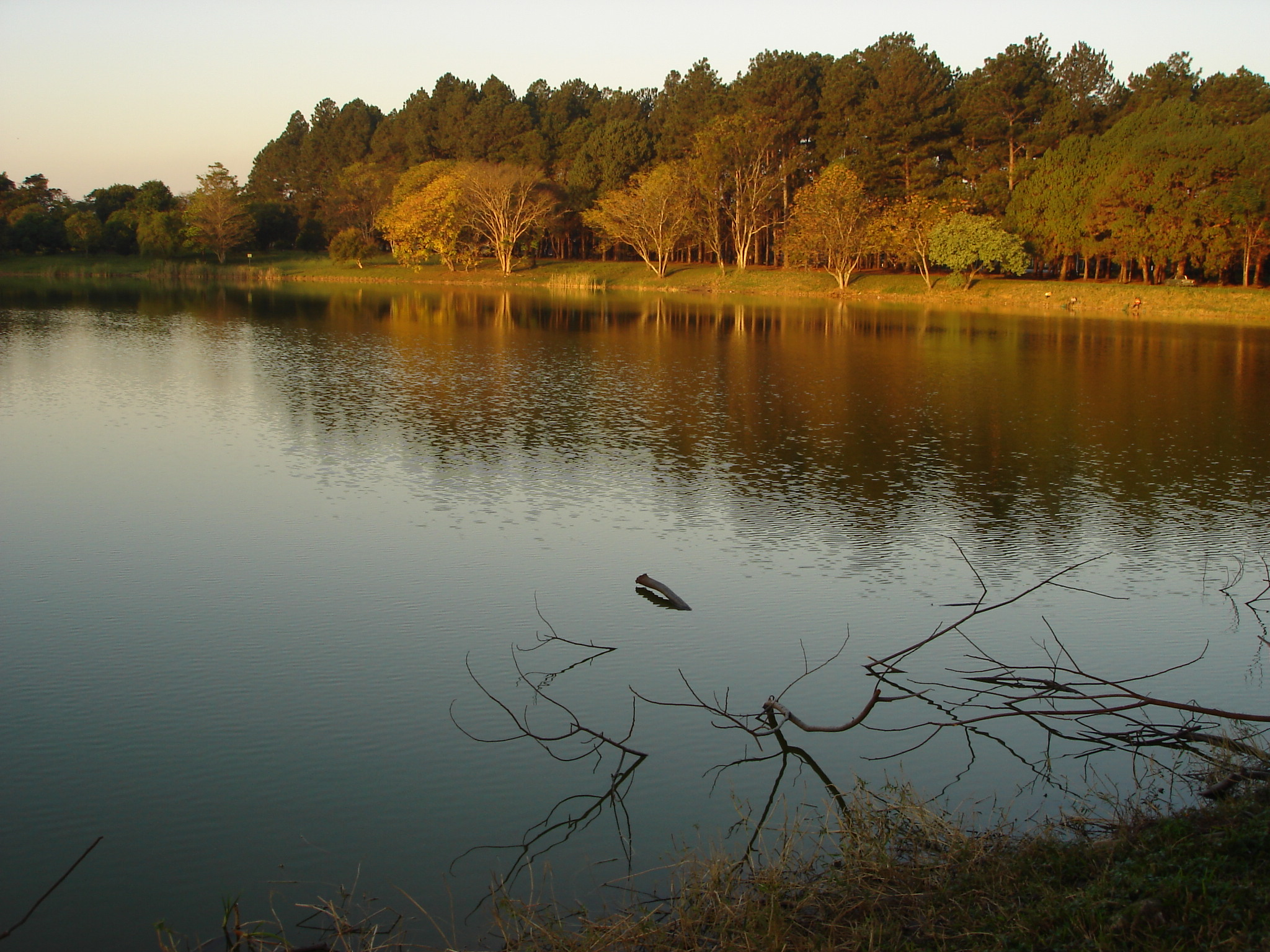 foto da lagoa do ita no cta em sao jose dos campos